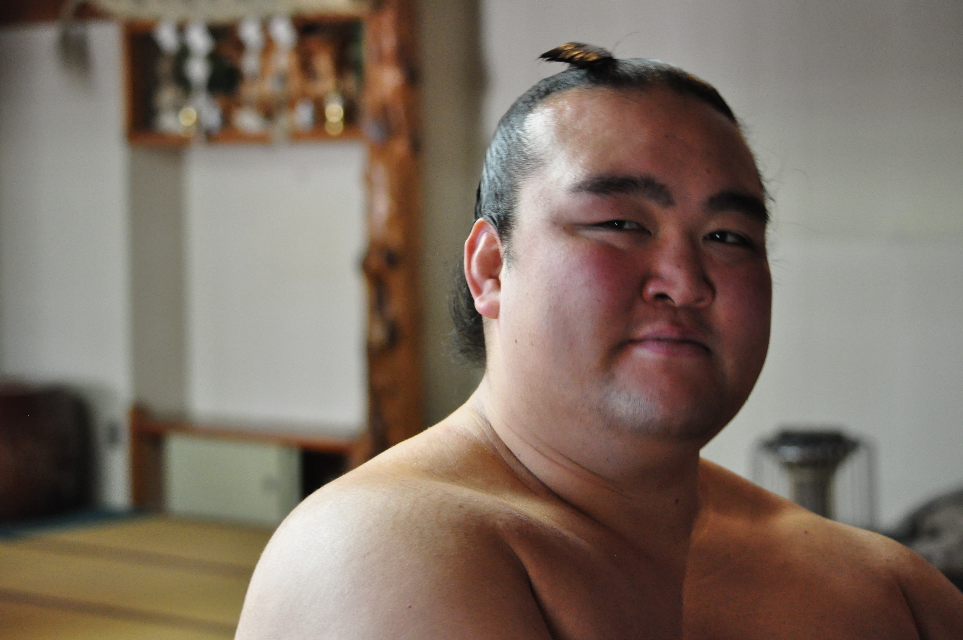 稀勢の里 寛